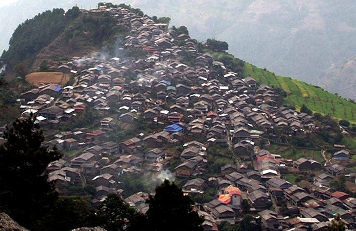 नेपाली: बार्पाकको एक दृष्य